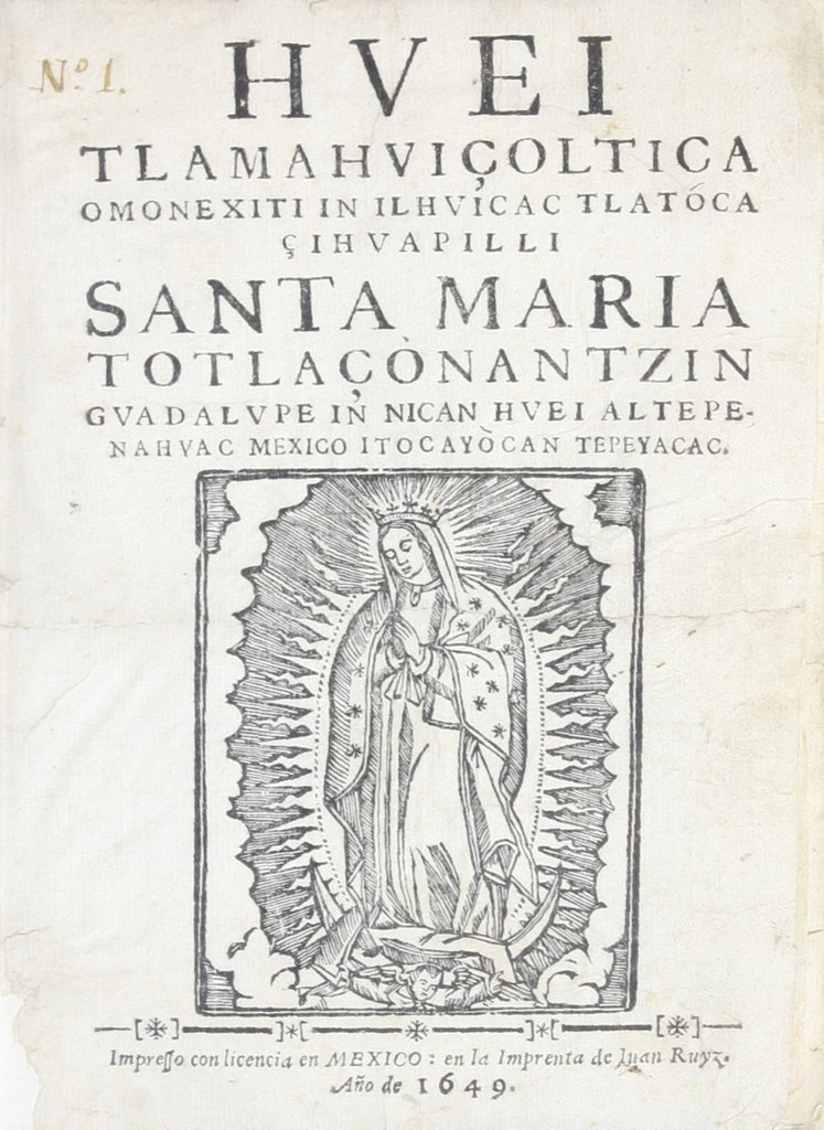 Luis Lasso de la Vega (Activo en Nueva España en la primera mitad del siglo XVII) Nican Mopohua [Hvei tlamahvçoltica amonexiti in ilhvicac tlatoca çihvapilli Santa María Totlaçonantizn] [Aquí se cuenta] 1649